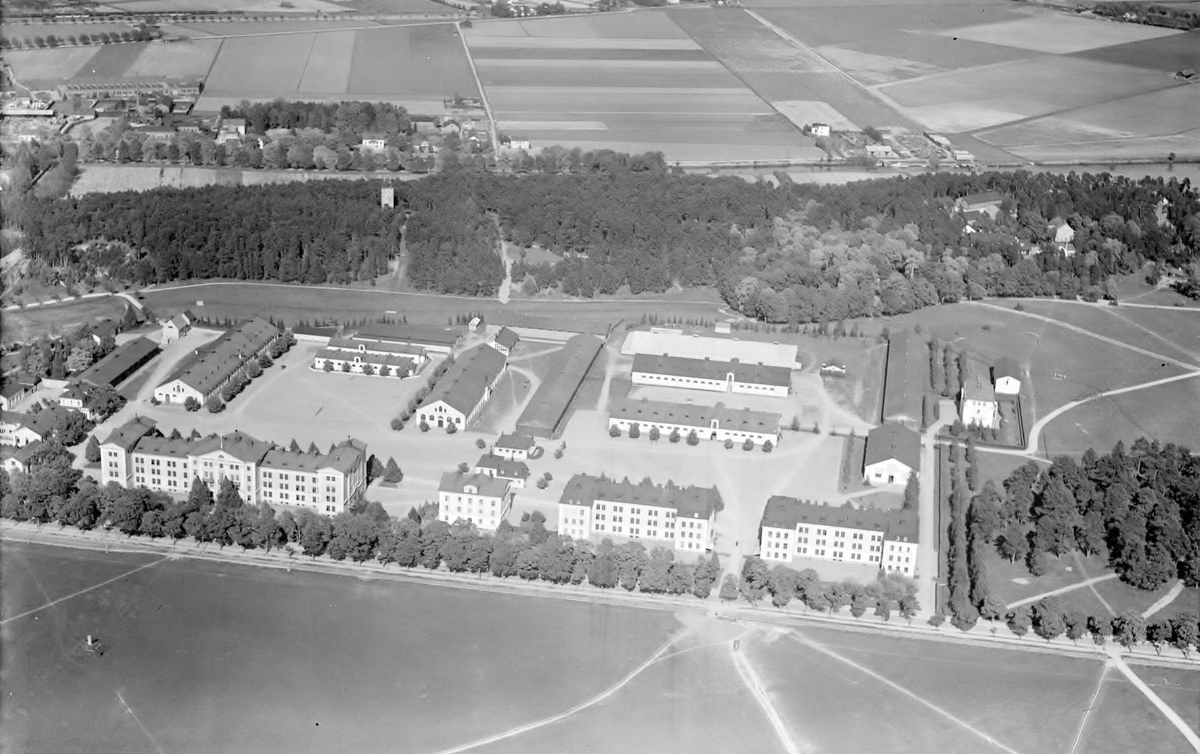 Flygfoto över Arméns Underofficersskola och före detta Upplands artilleriregemente, Dag Hammarskjölds väg, Uppsala år 1936